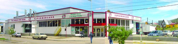 avenida tierra del fuego y brown